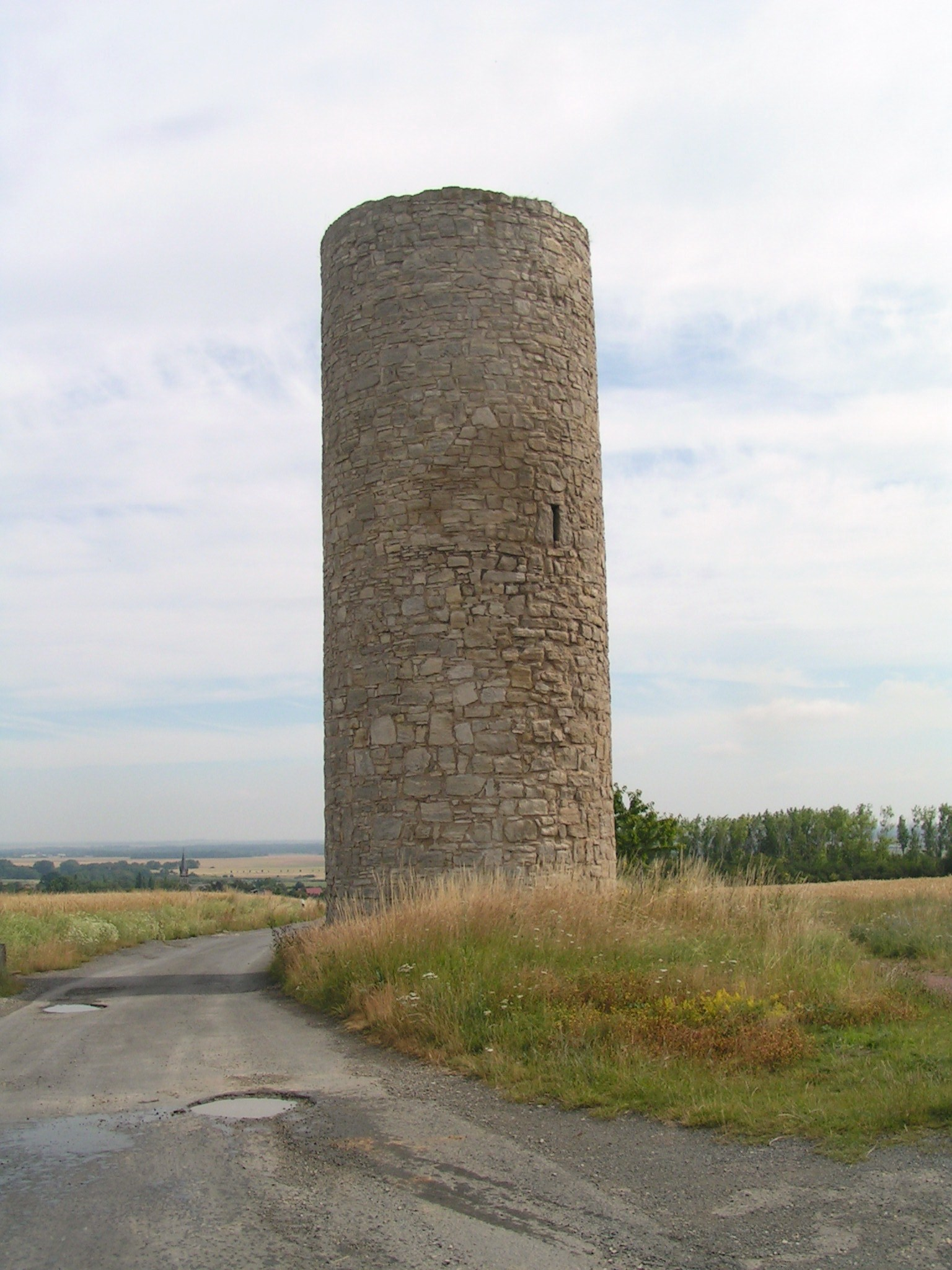 Wartturm Alte Warte nahe Hakeborn